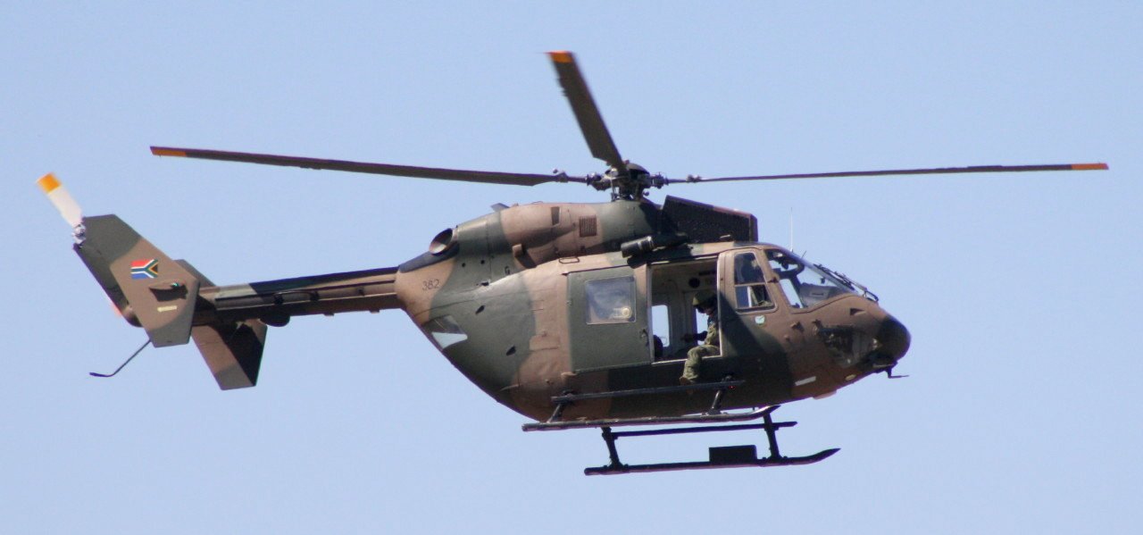 SAAF MBB Bk117A-3 382